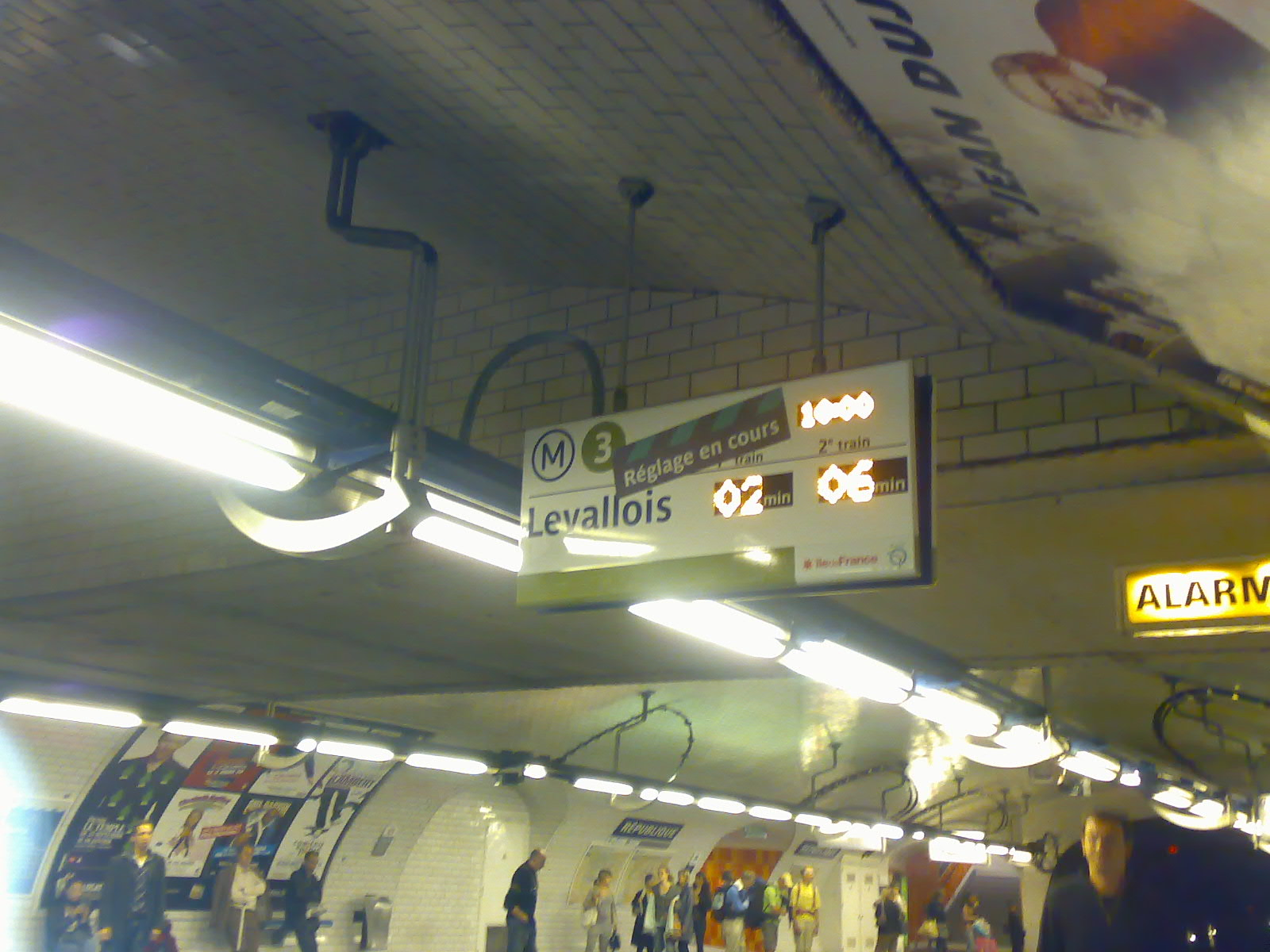 République station (Ligne 3) on the Paris Métropolitain network.